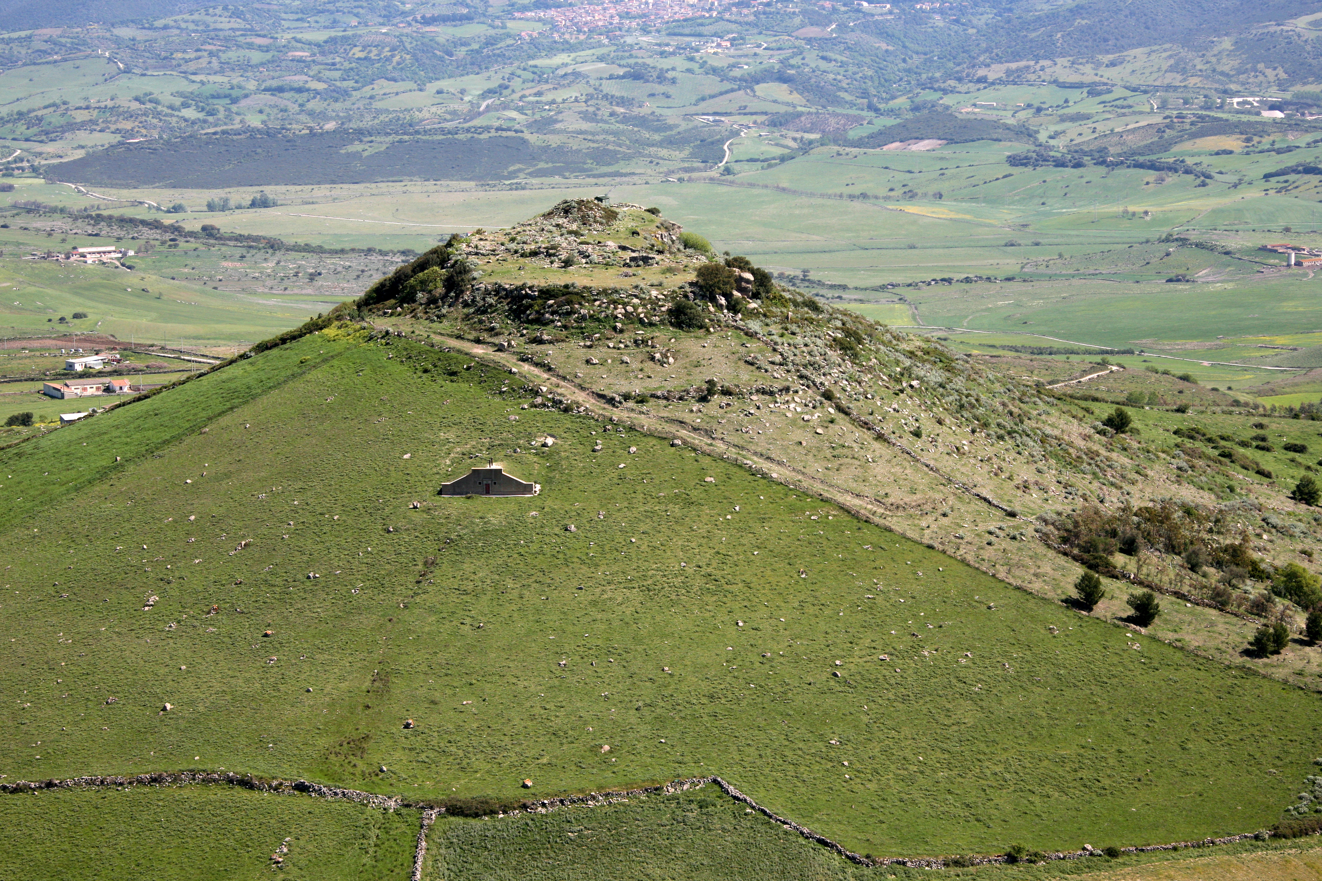 GENONI